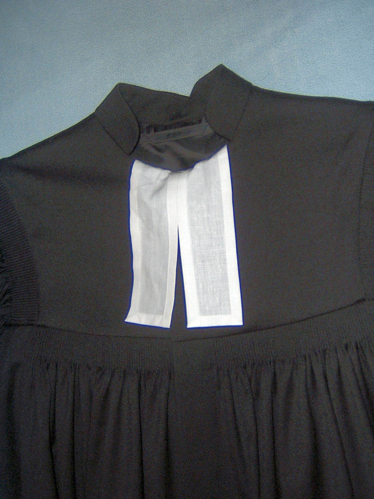 Beffchen, Teil der Amtstracht Evangelischer Pfarrerinnen und Pfarrer, unierte Ausführung